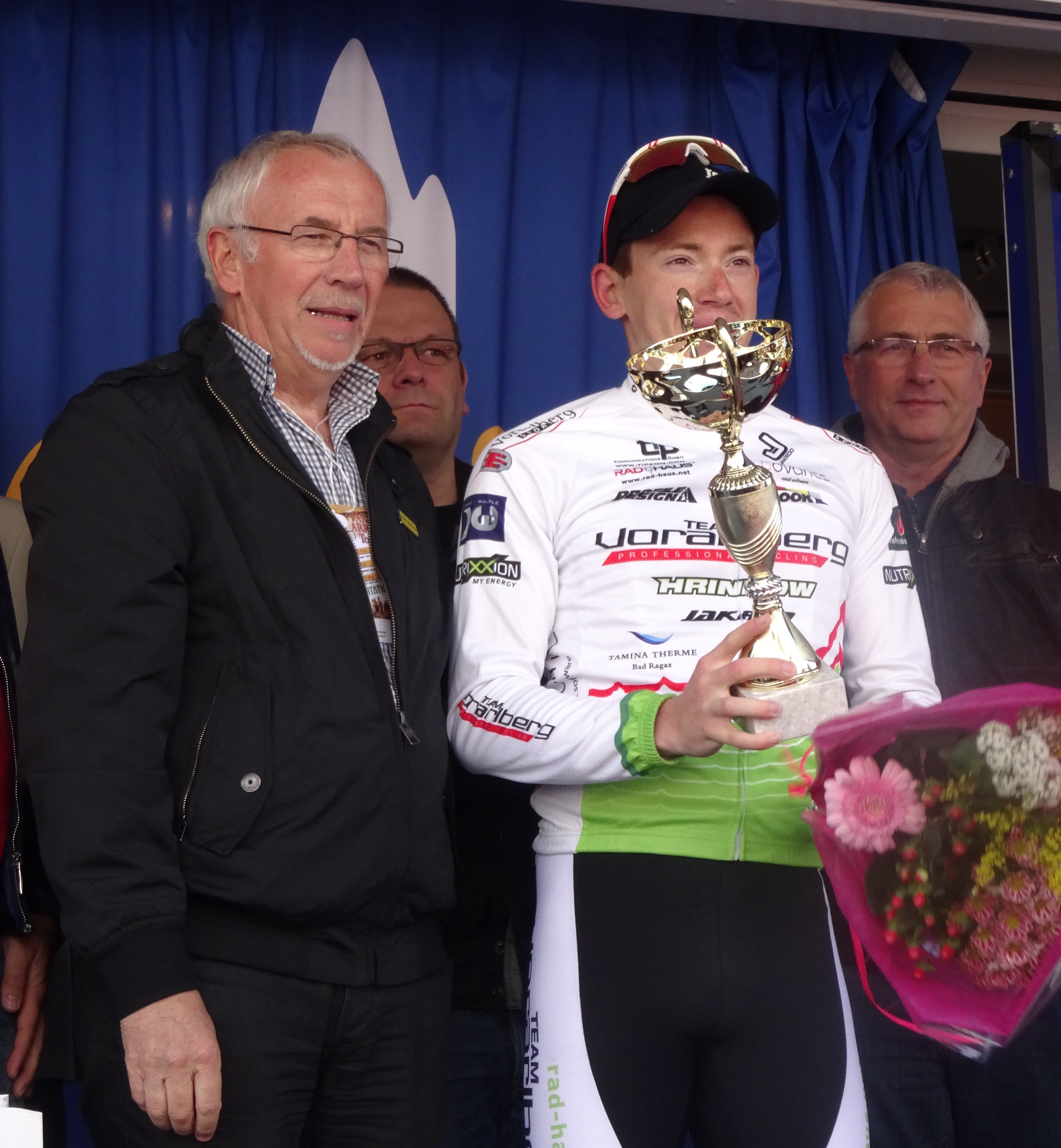 Reportage photographique réalisé le samedi 24 mai 2014 à l'occasion de l'arrivée de la deuxième étape du Paris-Arras Tour 2014 à Beaurains, Pas-de-Calais, Nord-Pas-de-Calais, France.